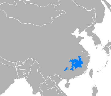 Idioma gan